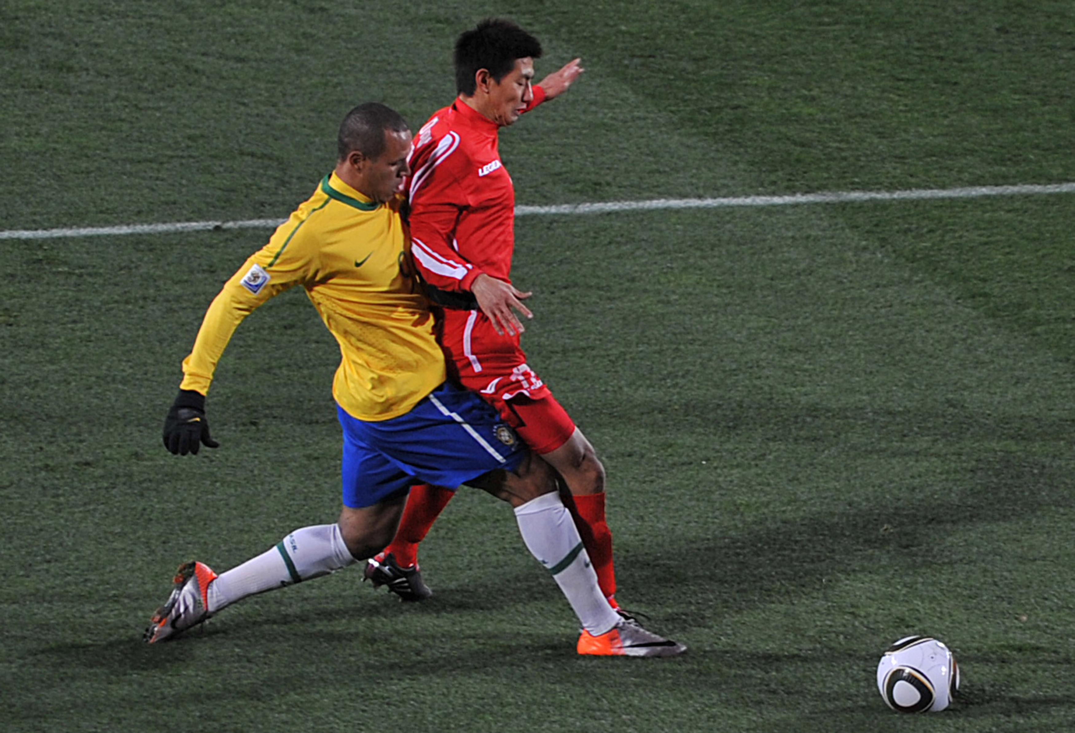 Seleção brasileira estreia na Copa do Mundo de 2010 contra a Coreia do Norte.